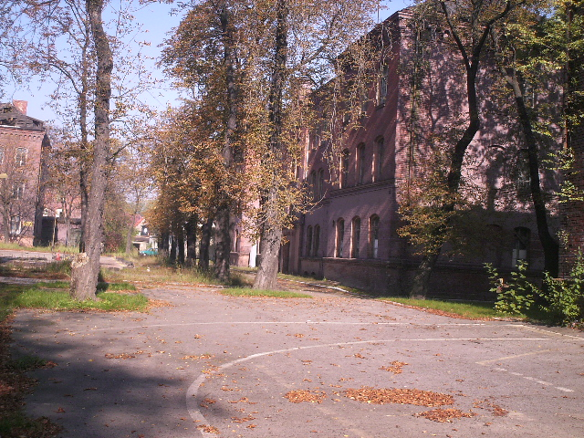 jeden z placów apelowych